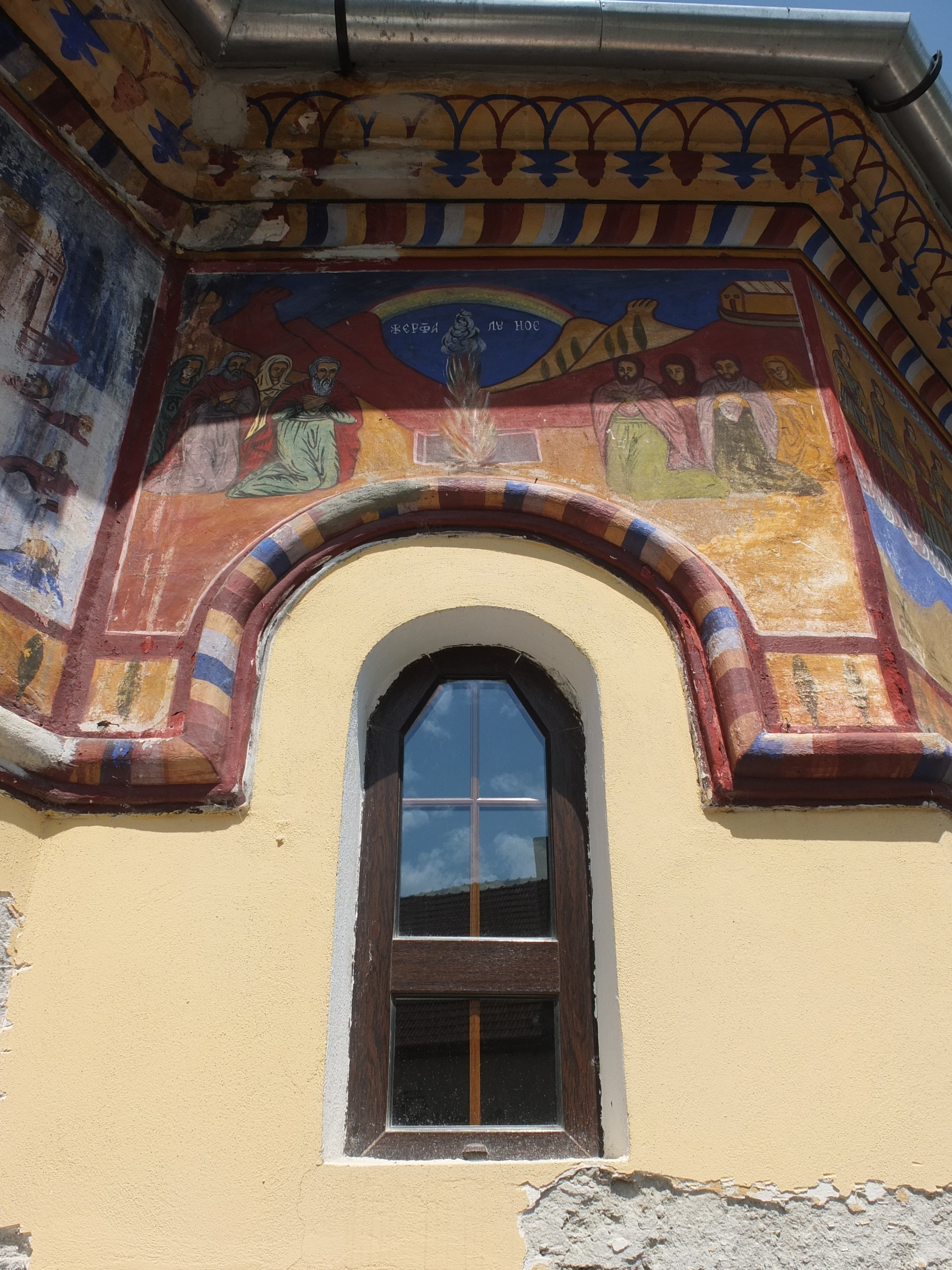 Biserica „Sf. Treime”-Dârste - Frescă pe latura sudică 01